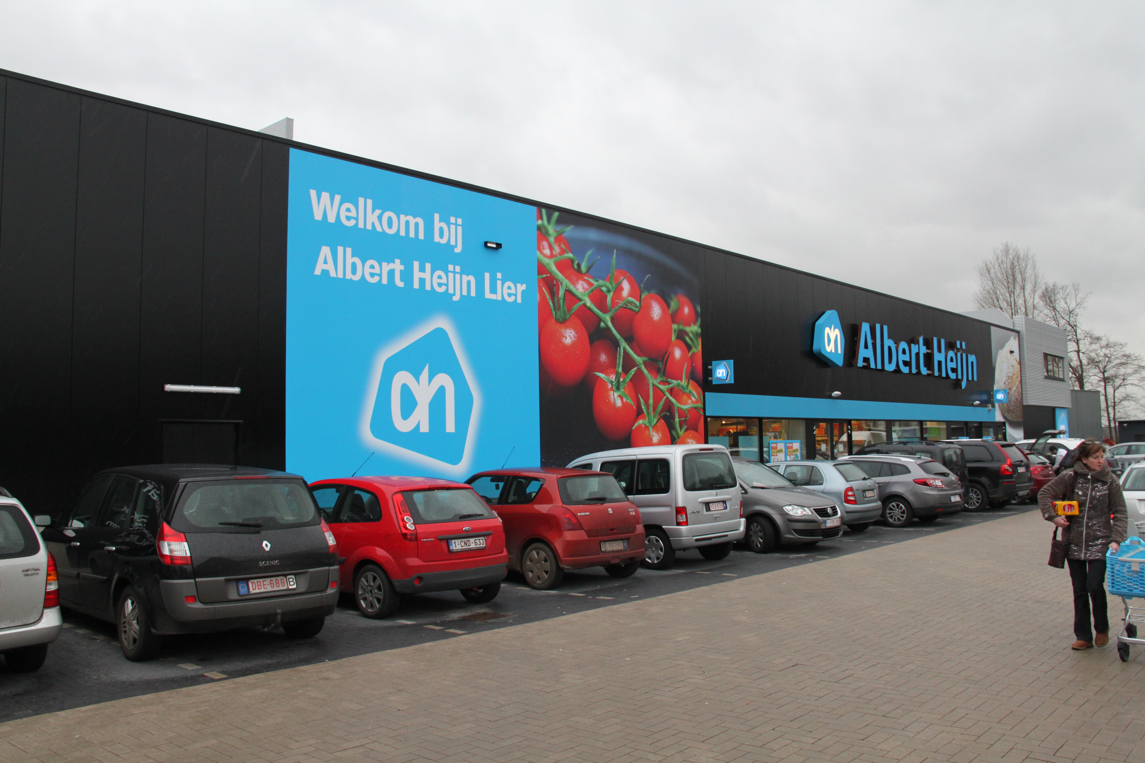 Foto van een Belgisch filiaal van de Nederlandse supermarktketen Albert Heijn, in Lier.